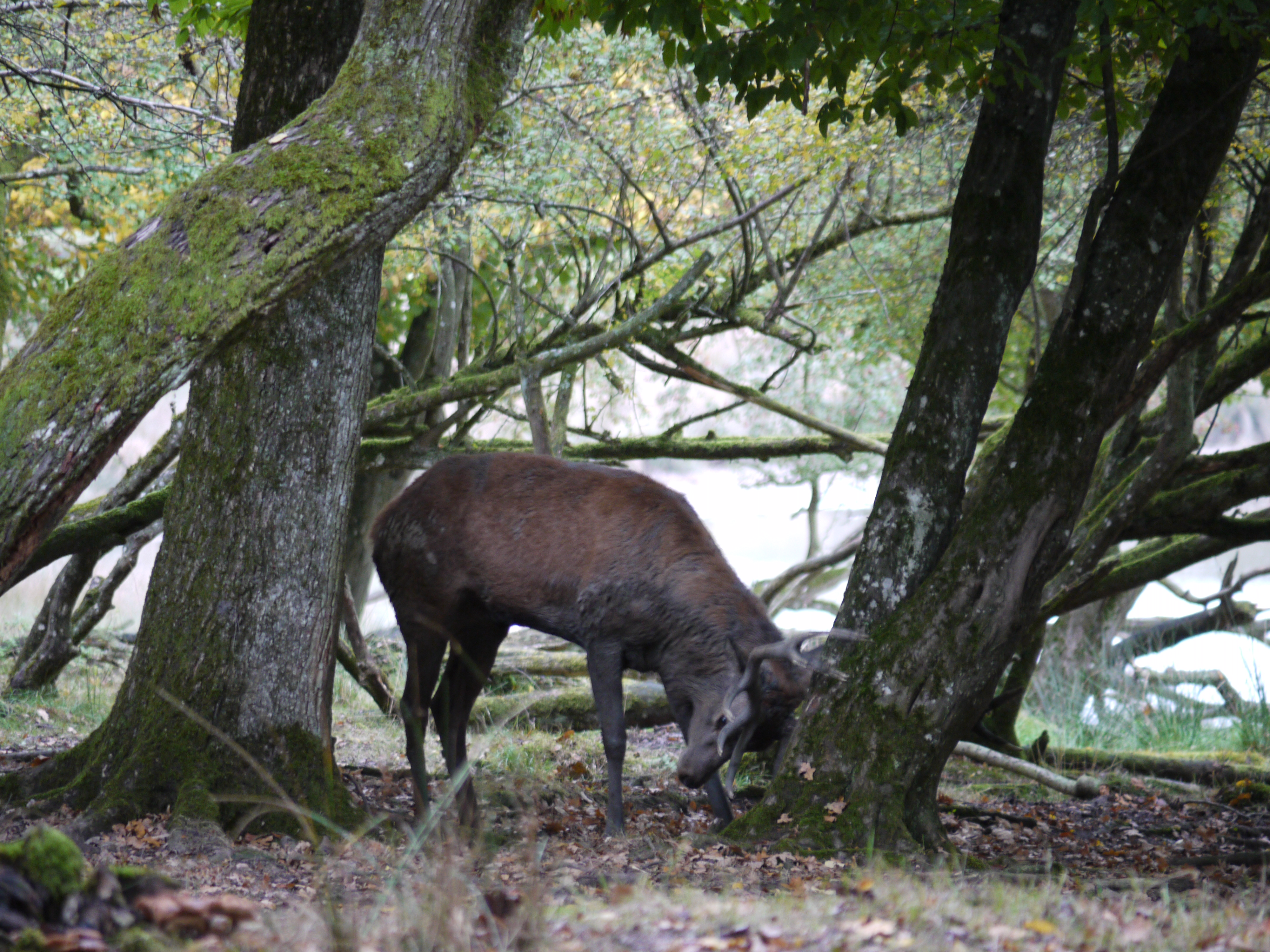 cerfs